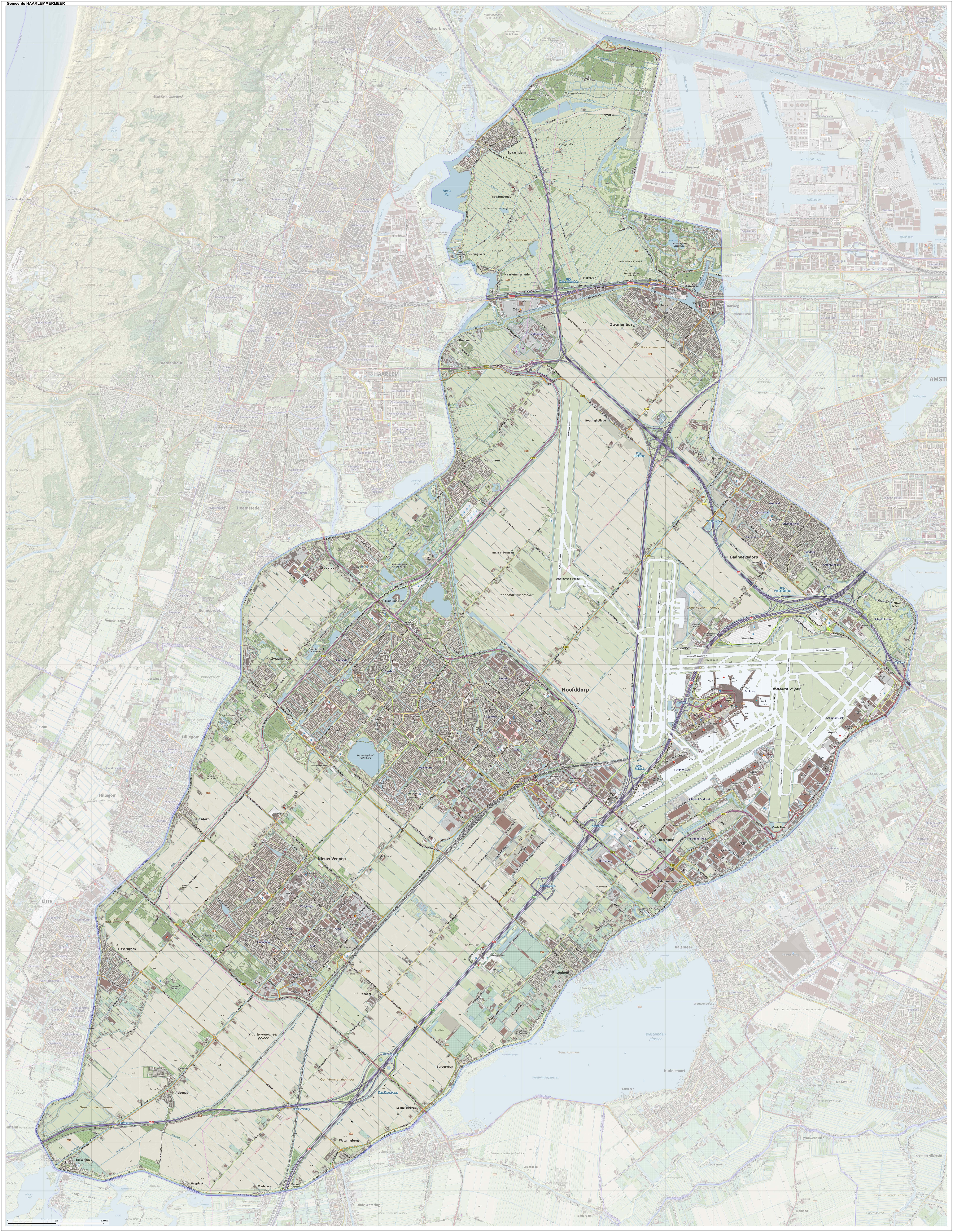 Topografische gemeentekaart. Resolutie: 400 pixels/km. Kaartbeeld samengesteld uit de open geodata van de Top10NL en Top25namen (Kadaster), Creative Commons-BY licentie. Gebouwvlakken uit open geodata BAG extract. Wegen uit de OpenStreetMap, OpenStreetMap community. Reliëfschaduw uit de Actuele Hoogtekaart AHN2. Samenstelling en kleurenschema: Jan-Willem van Aalst, met QGIS. Zie ook de Legenda.